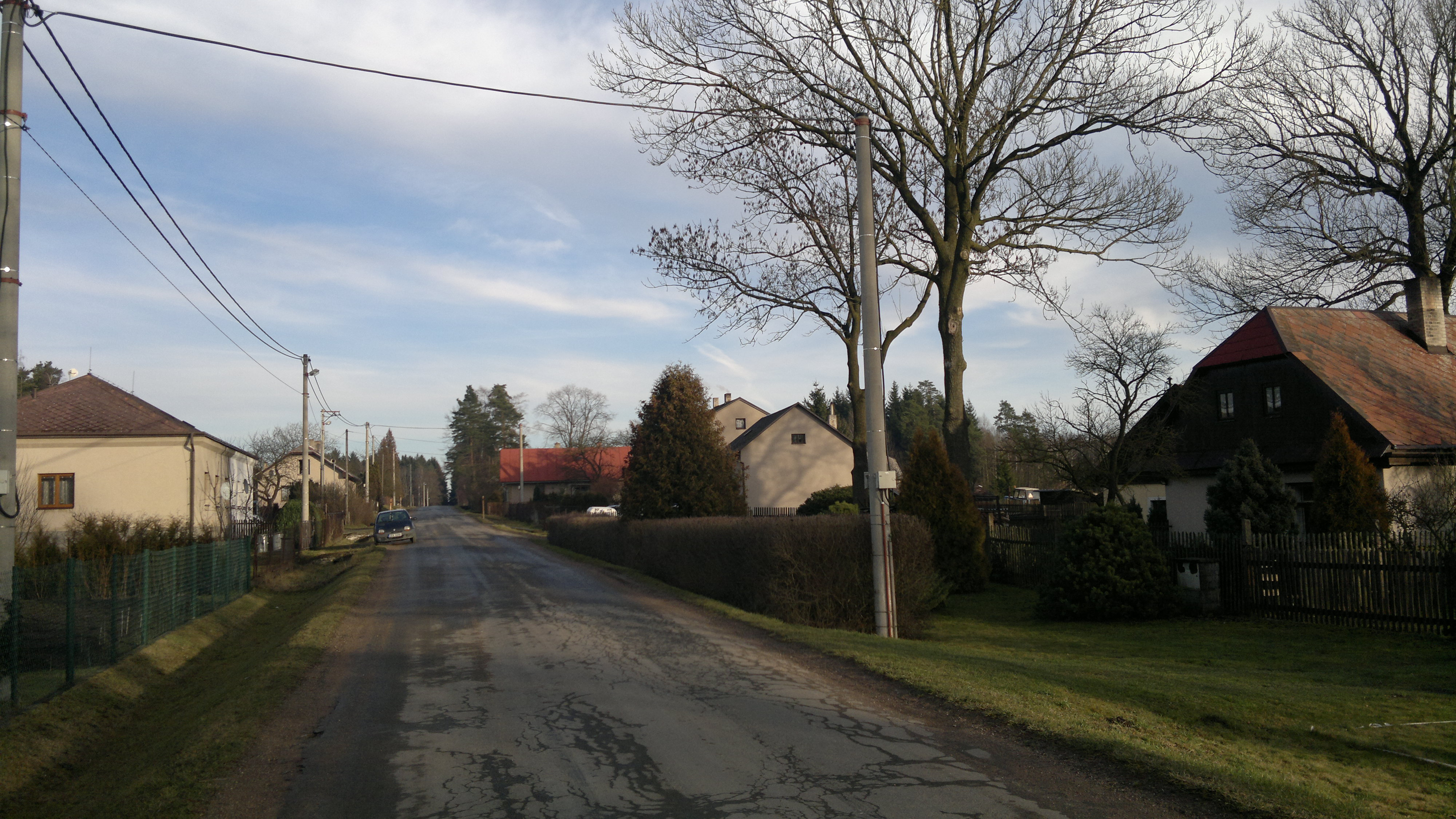 Obec Všeradov v okrese Chrudim